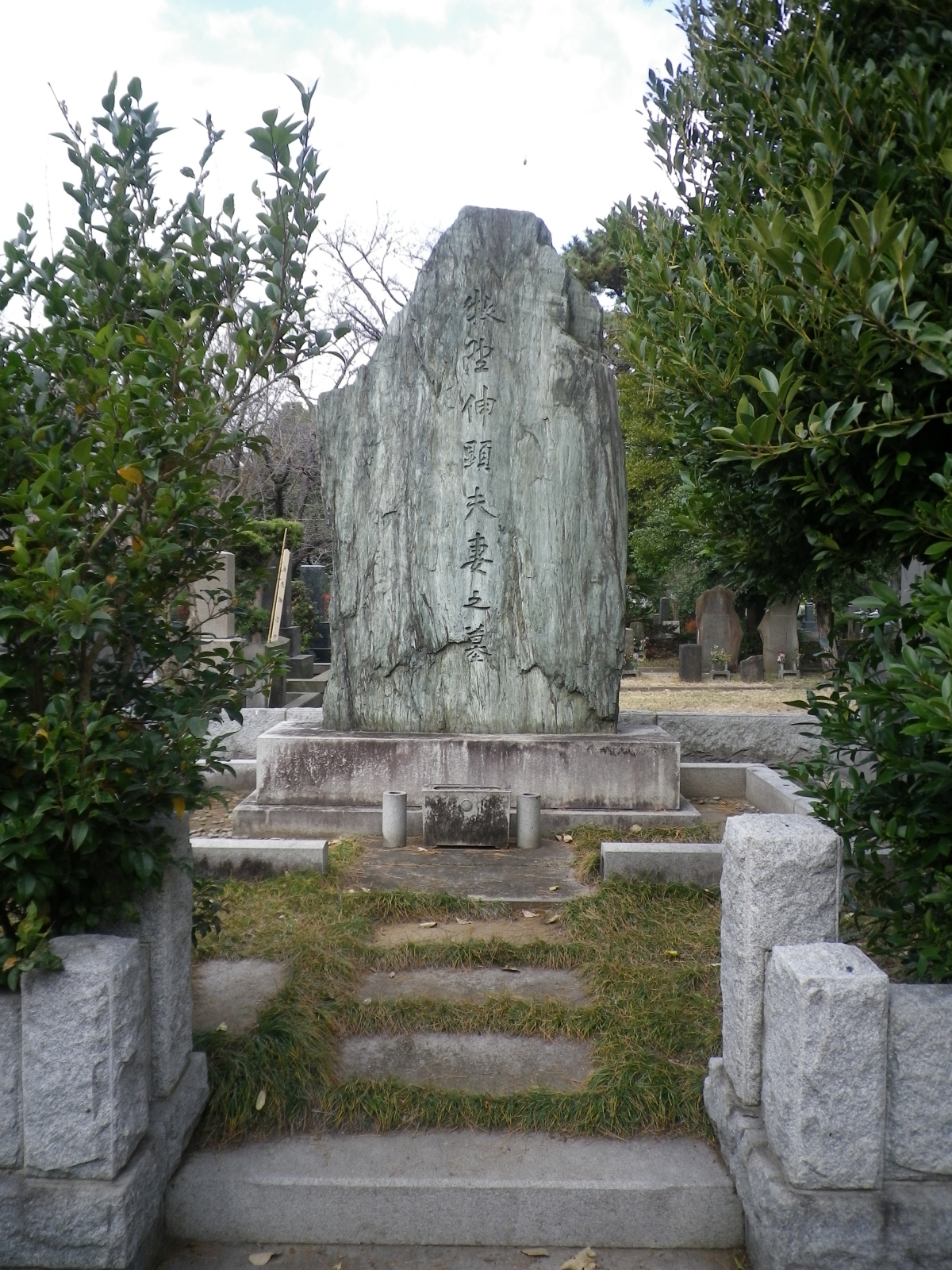 牧野伸顕の墓